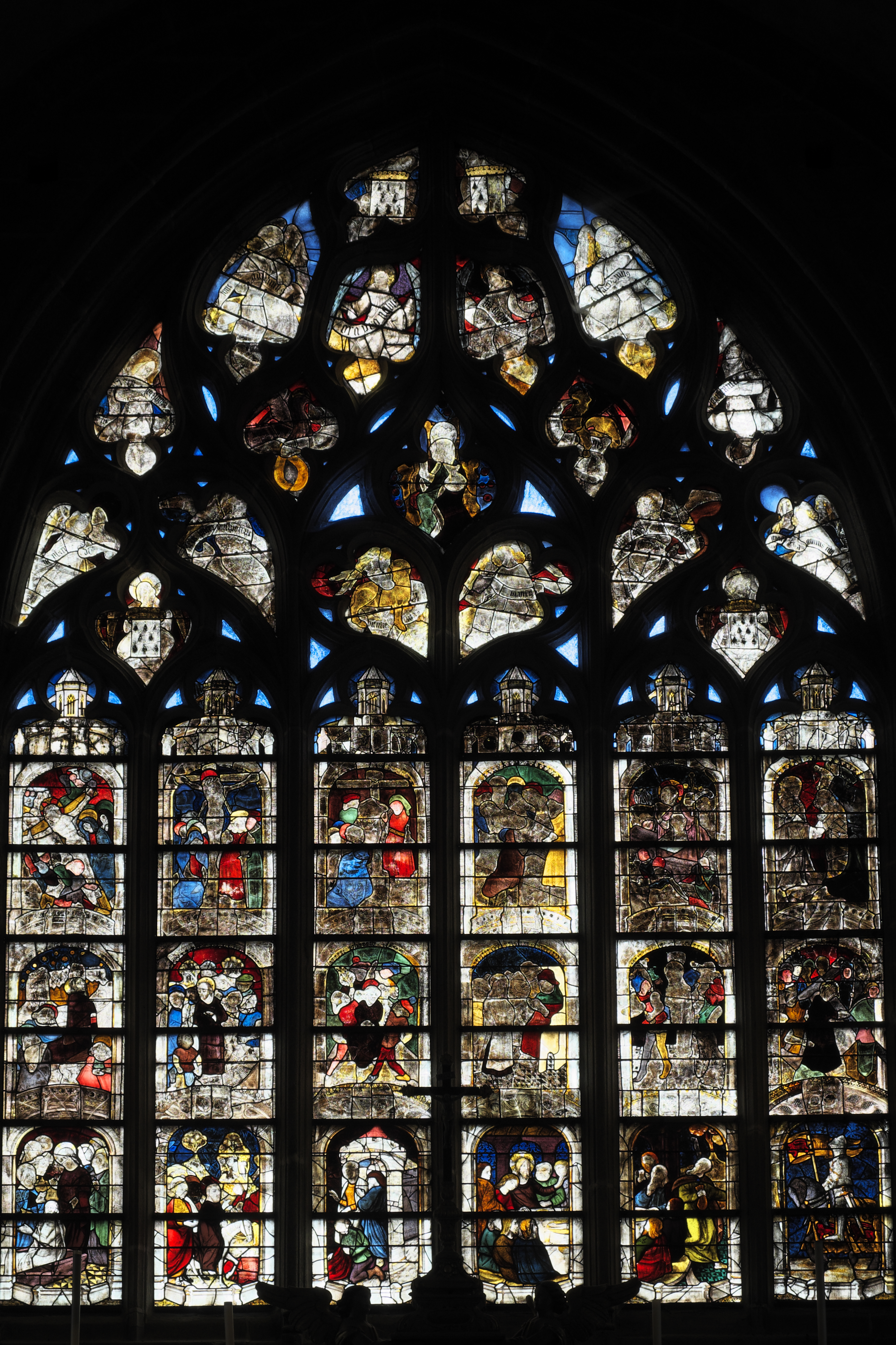 Katholische Kirche Saint-Ronan in Locronan im Département Finistère (Region Bretagne/Frankreich), Passionsfenster (baie 0) von 1476/79